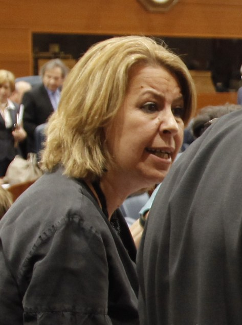 Primera sesión del debate de investidura de Esperanza Aguirre